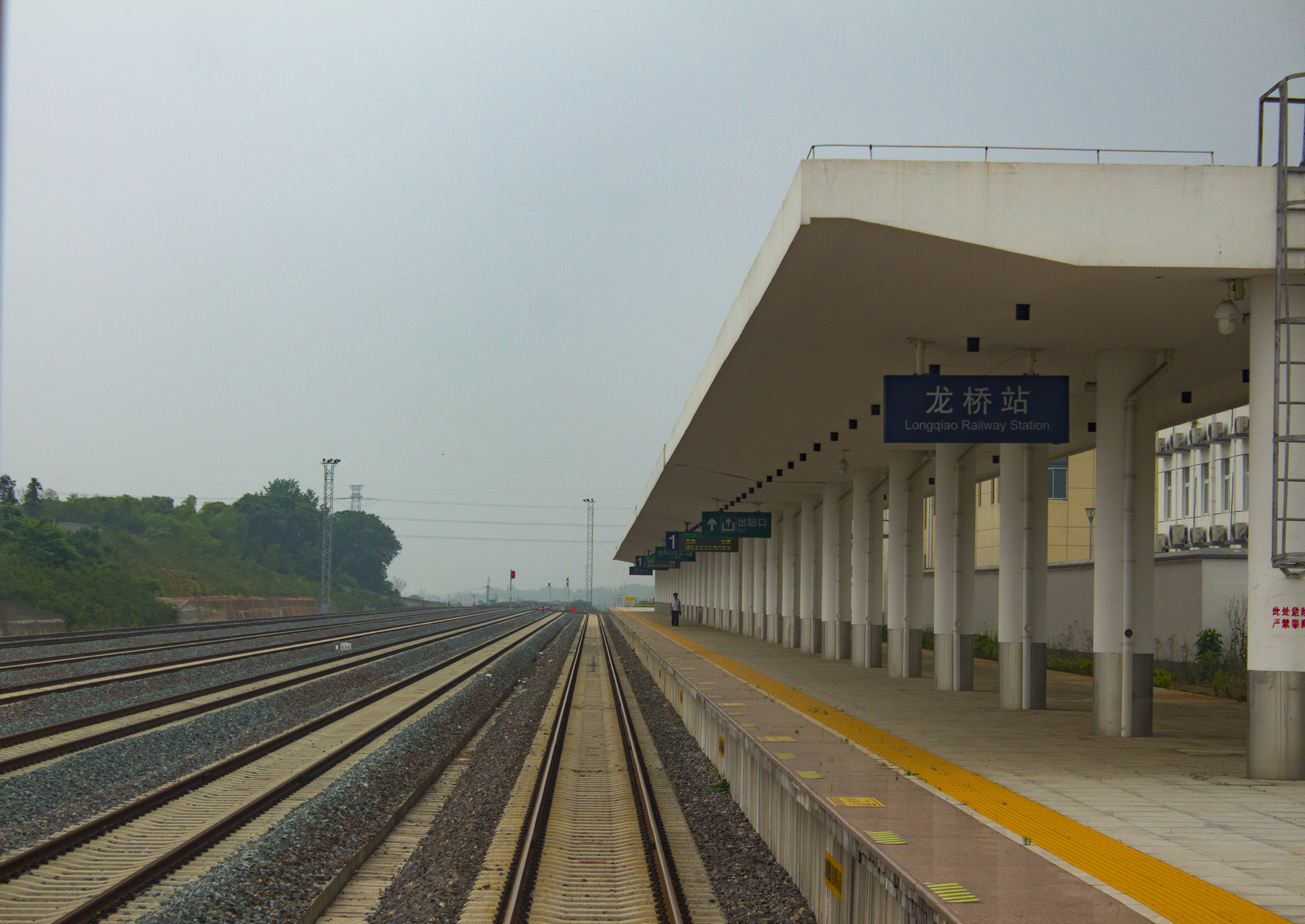 中文（中国大陆）: 龙桥站 K8525次列车列尾视角